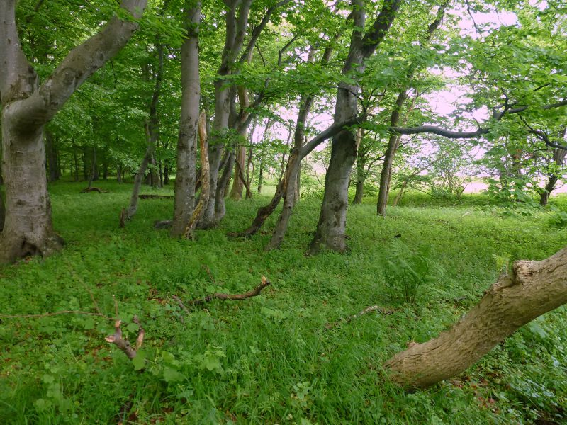 Naturschutzgebiet „Bewaldete Binnendüne bei Noer“, bewaldeter Strandwall (Fotografiert mit Betretungserlaubnis für das Naturschutzgebiet: 2.6-67.21.09 vom 15.01.2013 Kreis Rendsburg-Eckernförde)